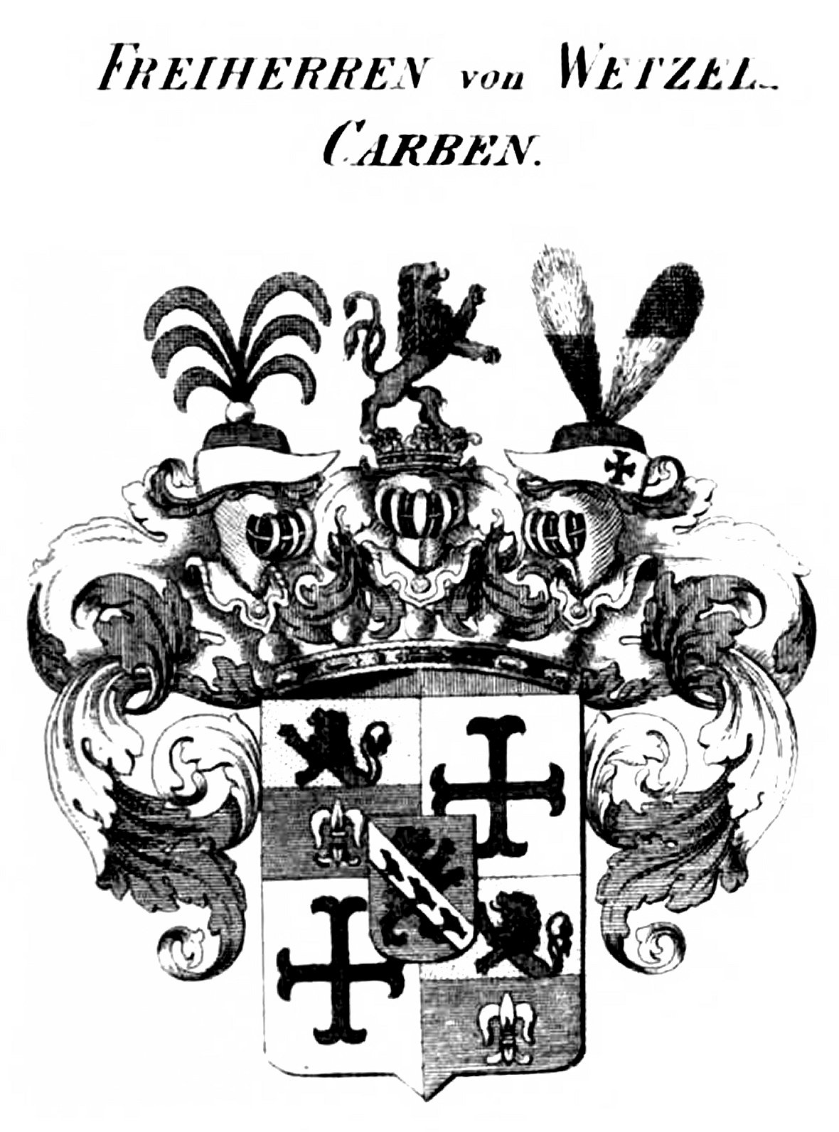 Wappen Wetzel Carben 2 - Tyroff AT.jpg